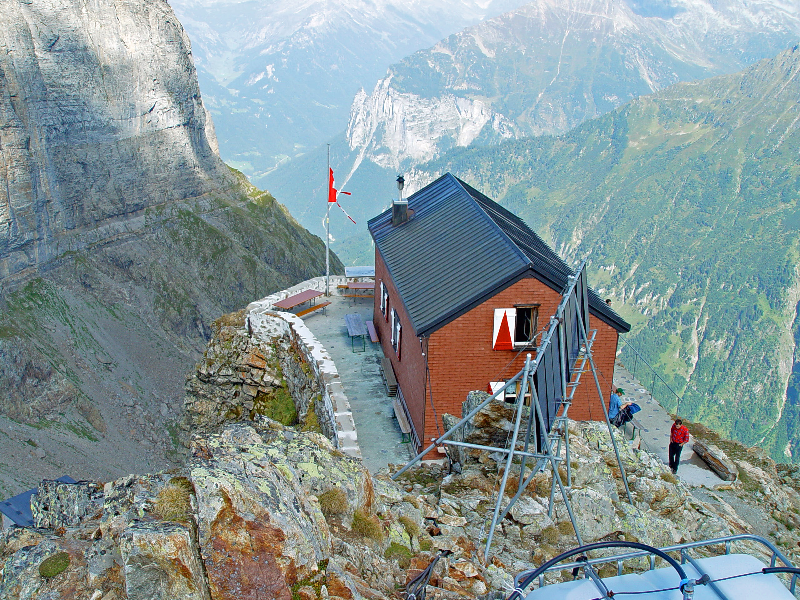 Blick auf Dossenhütte von oben. Sommer 2006.